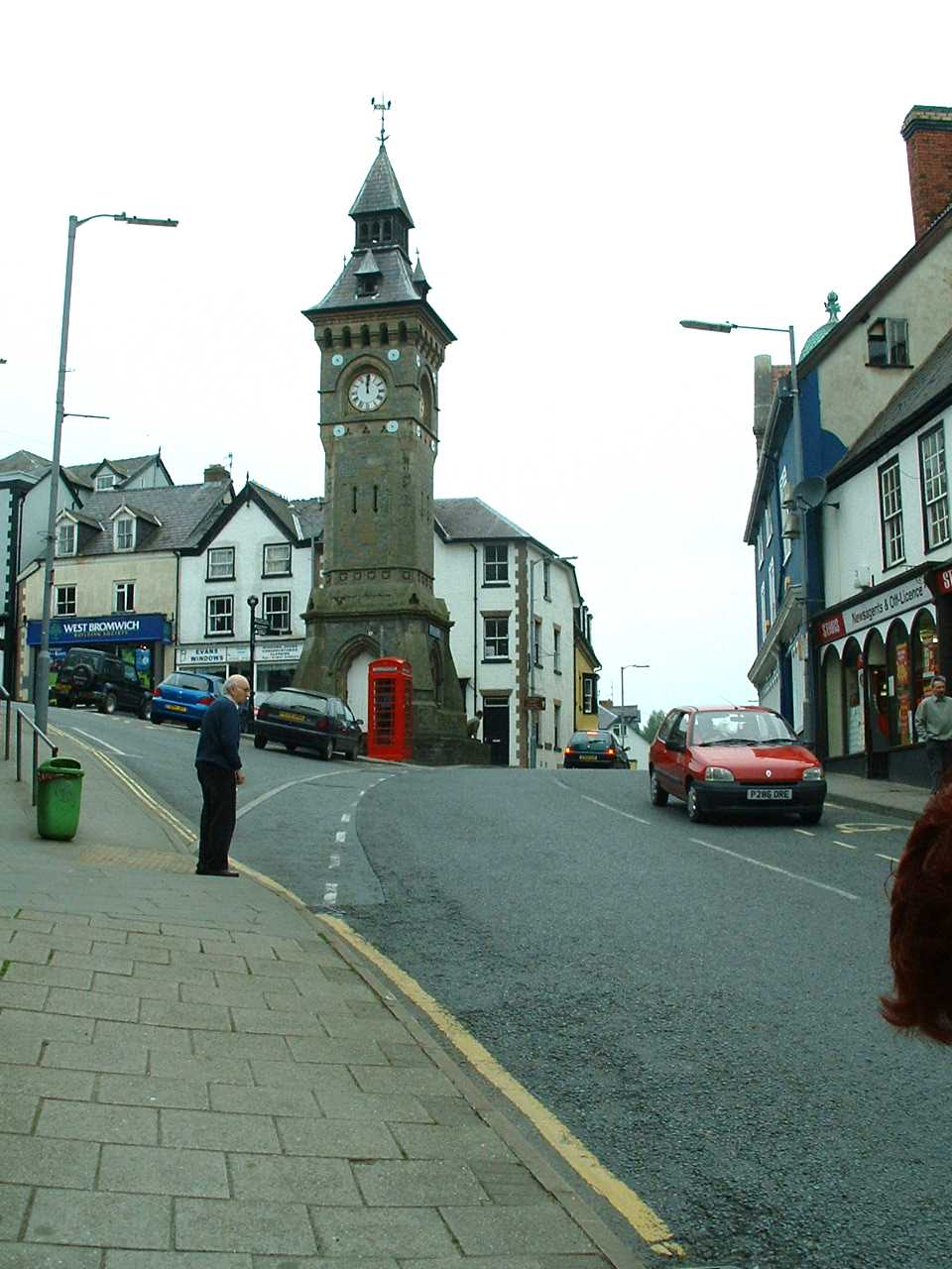 Eigen opname